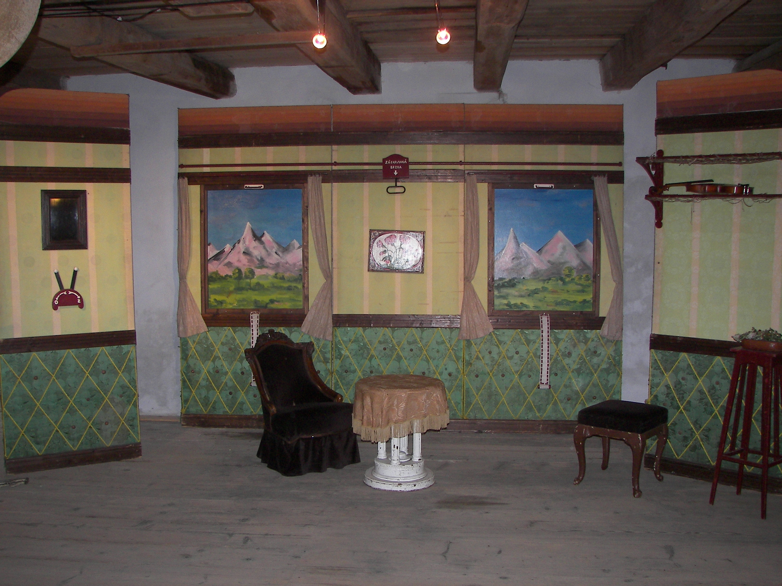 Scéna ze hry Vražda v salónním coupé